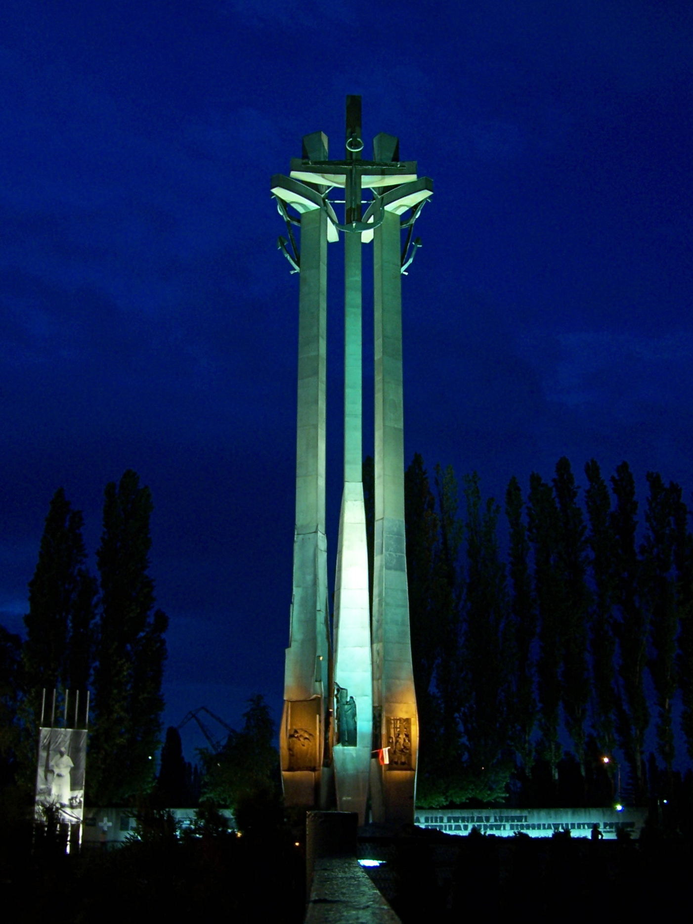 Pomnik Poległych Stoczniowców w Gdańsku.